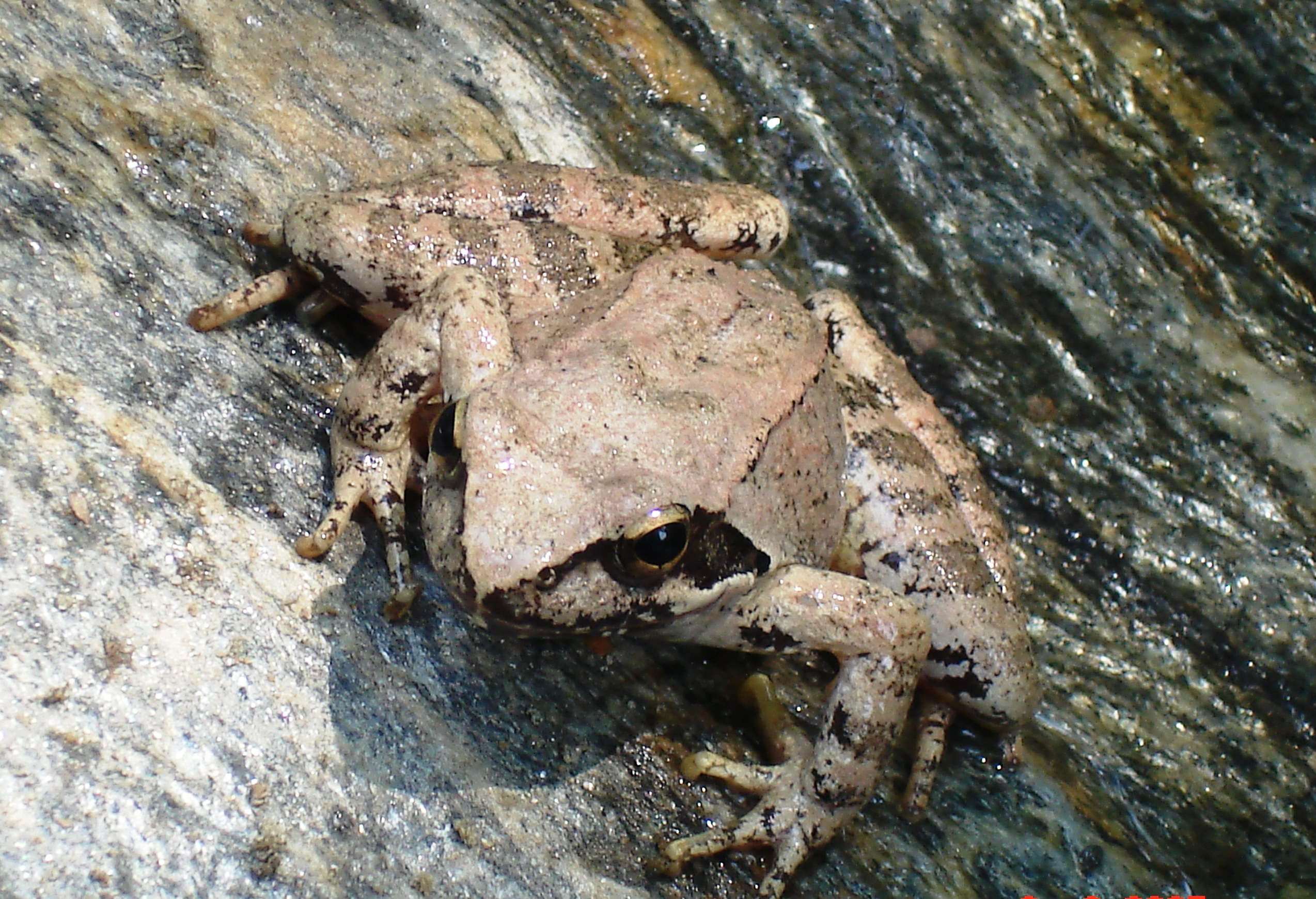 Маркова река фауна...жаба